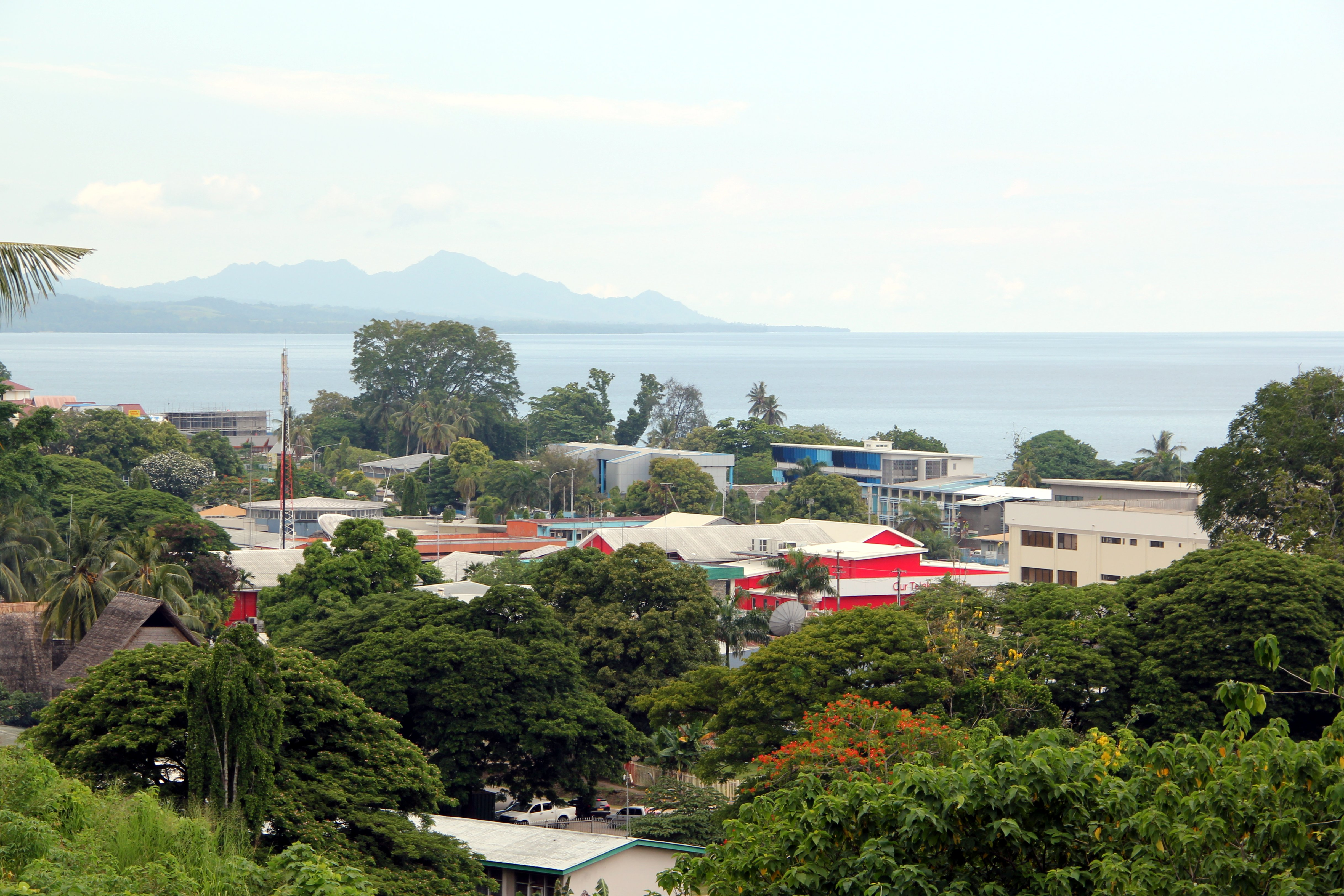 Hillside view